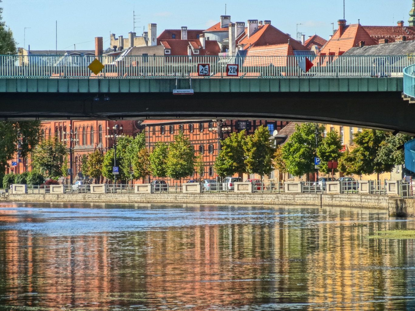 Most Bernardyński w Bydgoszczy